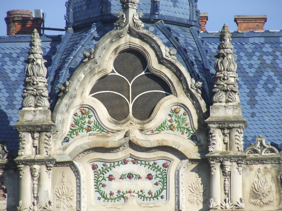 Dacia Hotel, Satu Mare, Romania